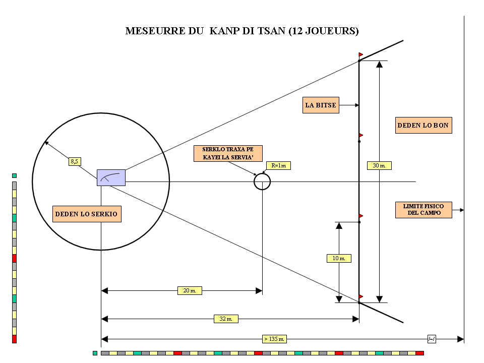 Campo di tsan - Lo tsan è un antico e popolare sport di squadra valdostano che ricorda vagamente il baseball e oina romena. Questo sport viene praticato in due campionati, uno primaverile e uno autunnale, e non è tradizionalmente diffuso in tutta la Valle d'Aosta ma solamente nei comuni della media valle centrale tra Montjovet ed Aosta, in Val d'Ayas e in Valtournenche, anche se le sezioni locali sono in espansione ad altre zone.